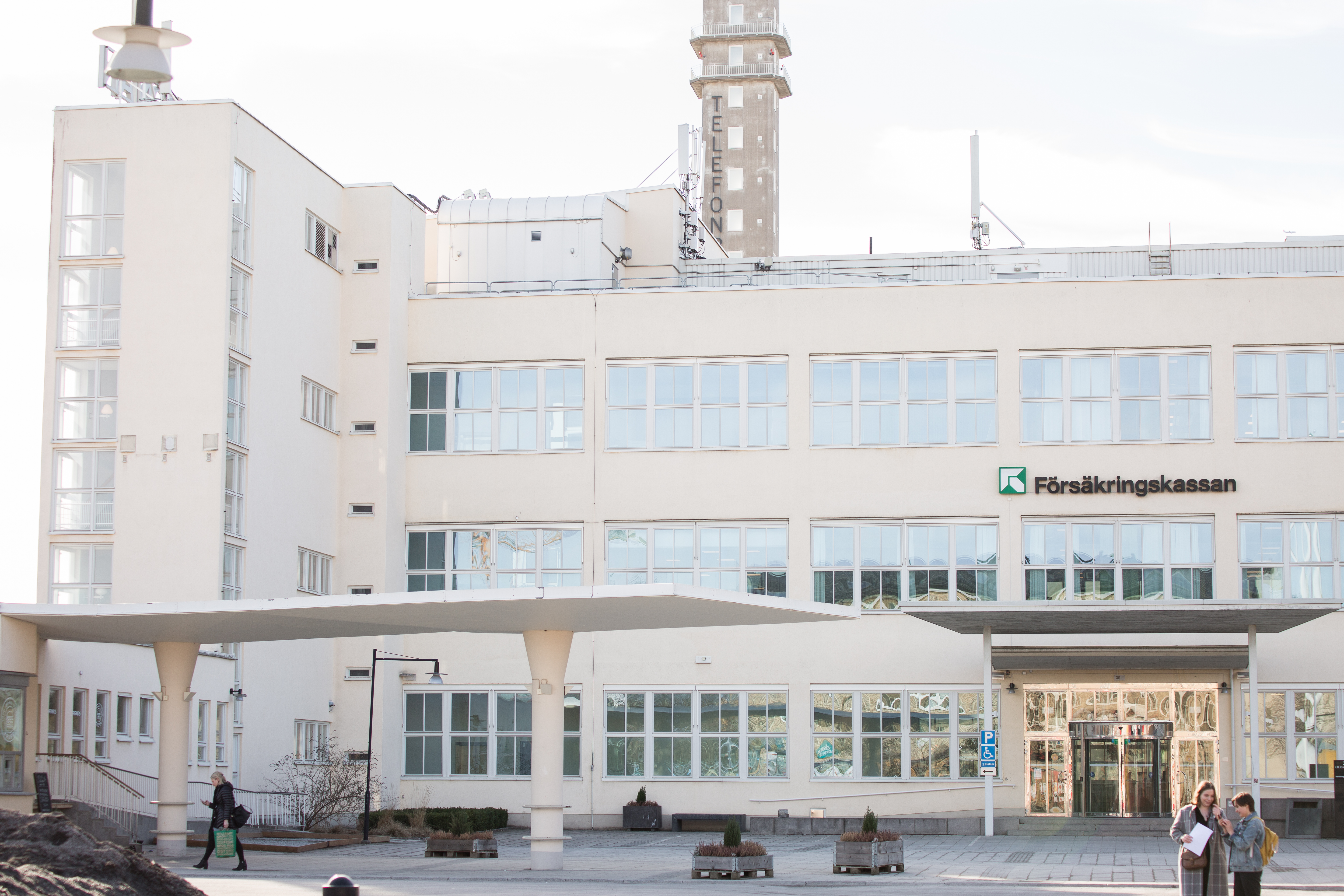 Försäkringskassans huvudkontor fasad LM Ericssons väg 30 Telefonplan